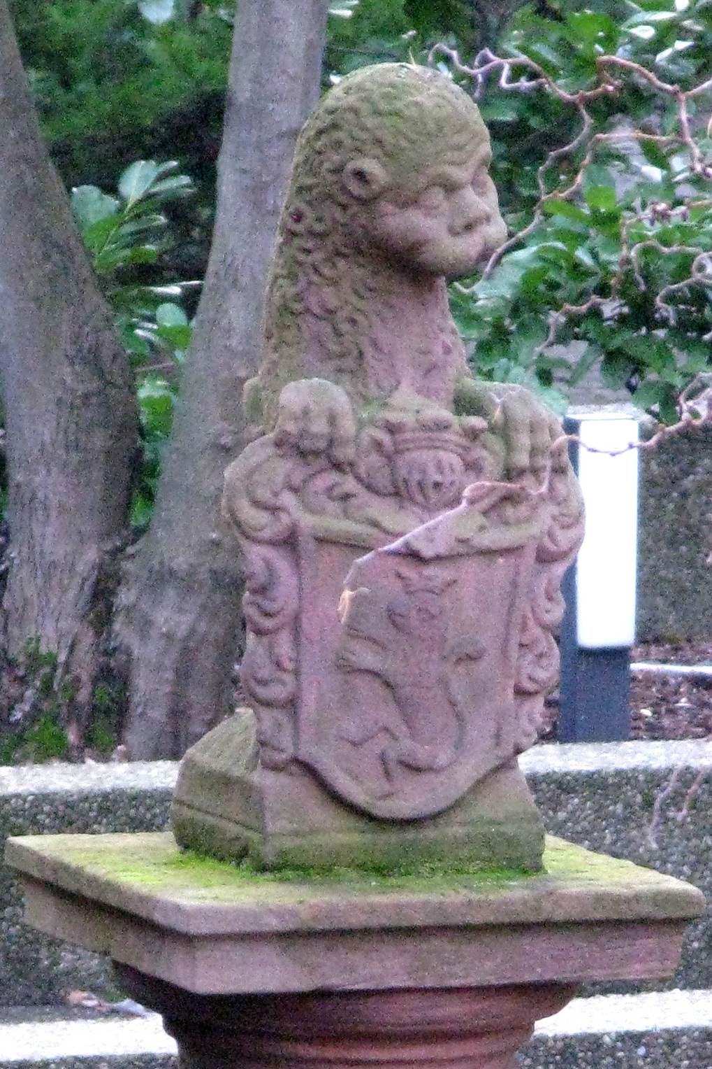 Diese Brunnensäule aus rotem Sandstein mit dem Wappen der Freiherren von Pfirt, stand früher beim Andlauschen Haus in der Herrenstraße in Freiburg. Heute steht sie auf dem Gelände der Fachschule für Sozialpädagogik der Erzdiözese an der Händelstraße in Herdern.